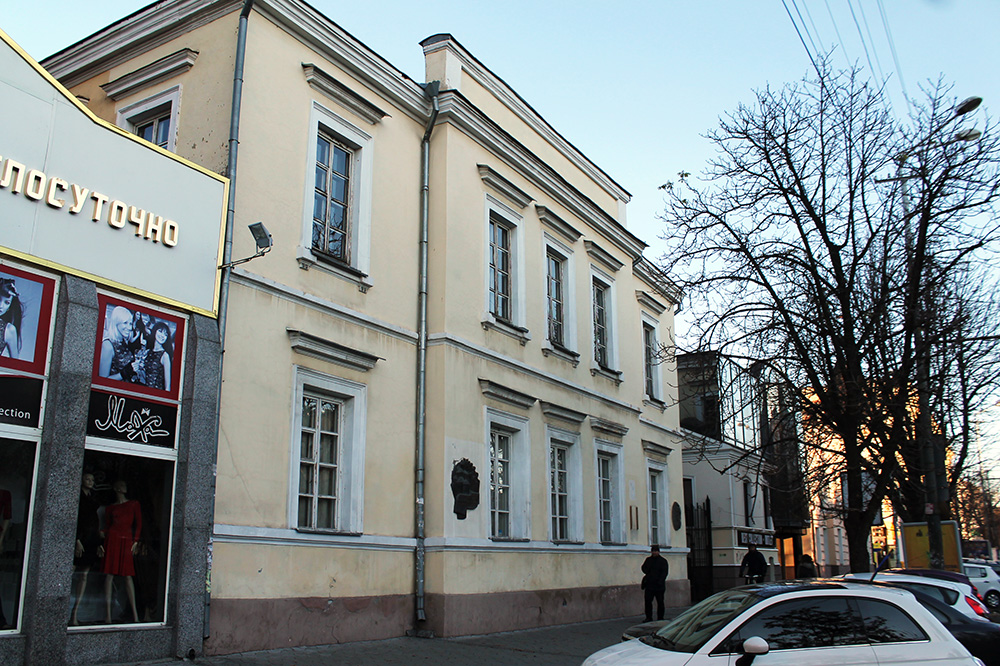 Музей "Літературне Придніпров'я" у Дніпрі.